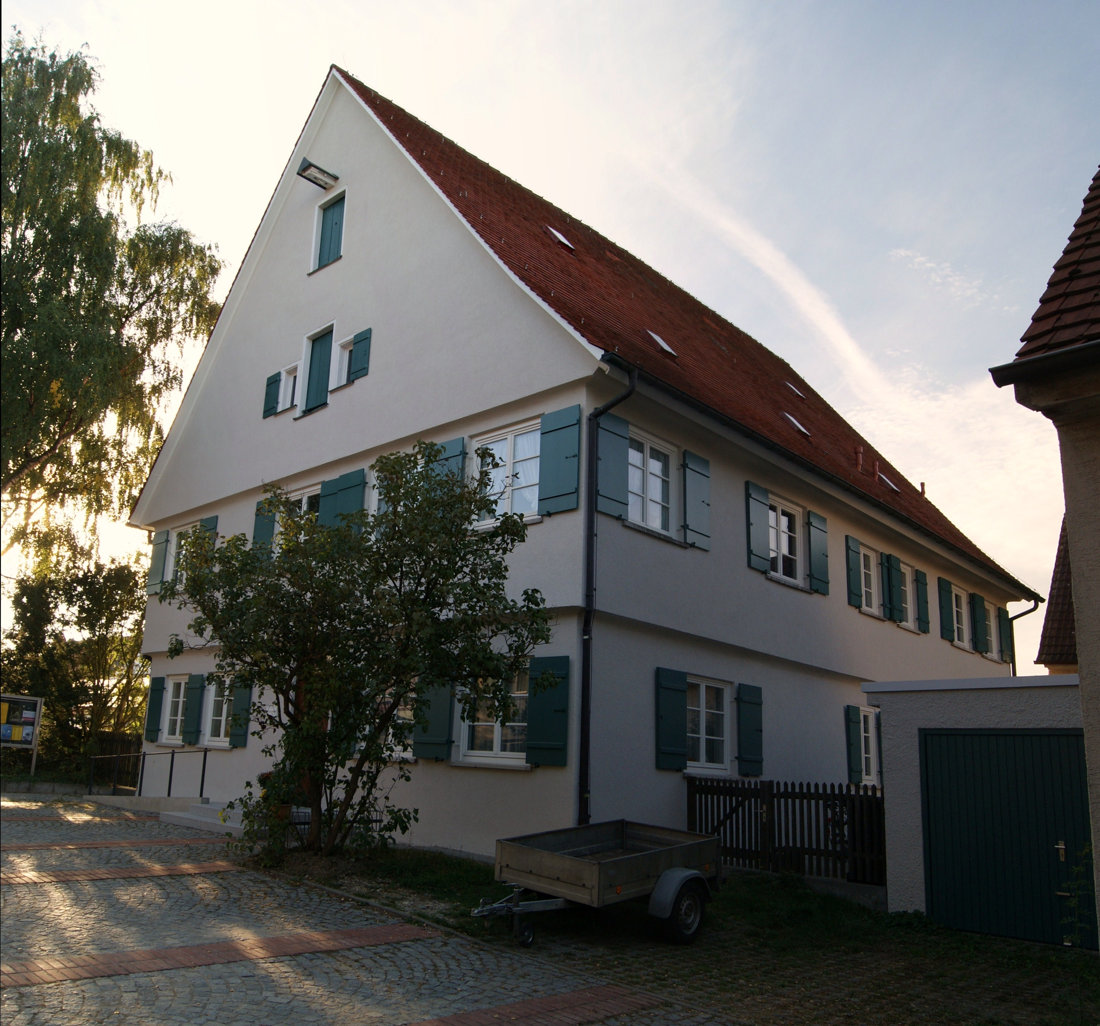 Pfarrhaus, verputzter Fachwerkbau mit Satteldach und Aufzugsluken, 1655 von Joseph Furttenbach.This is a photograph of an architectural monument.